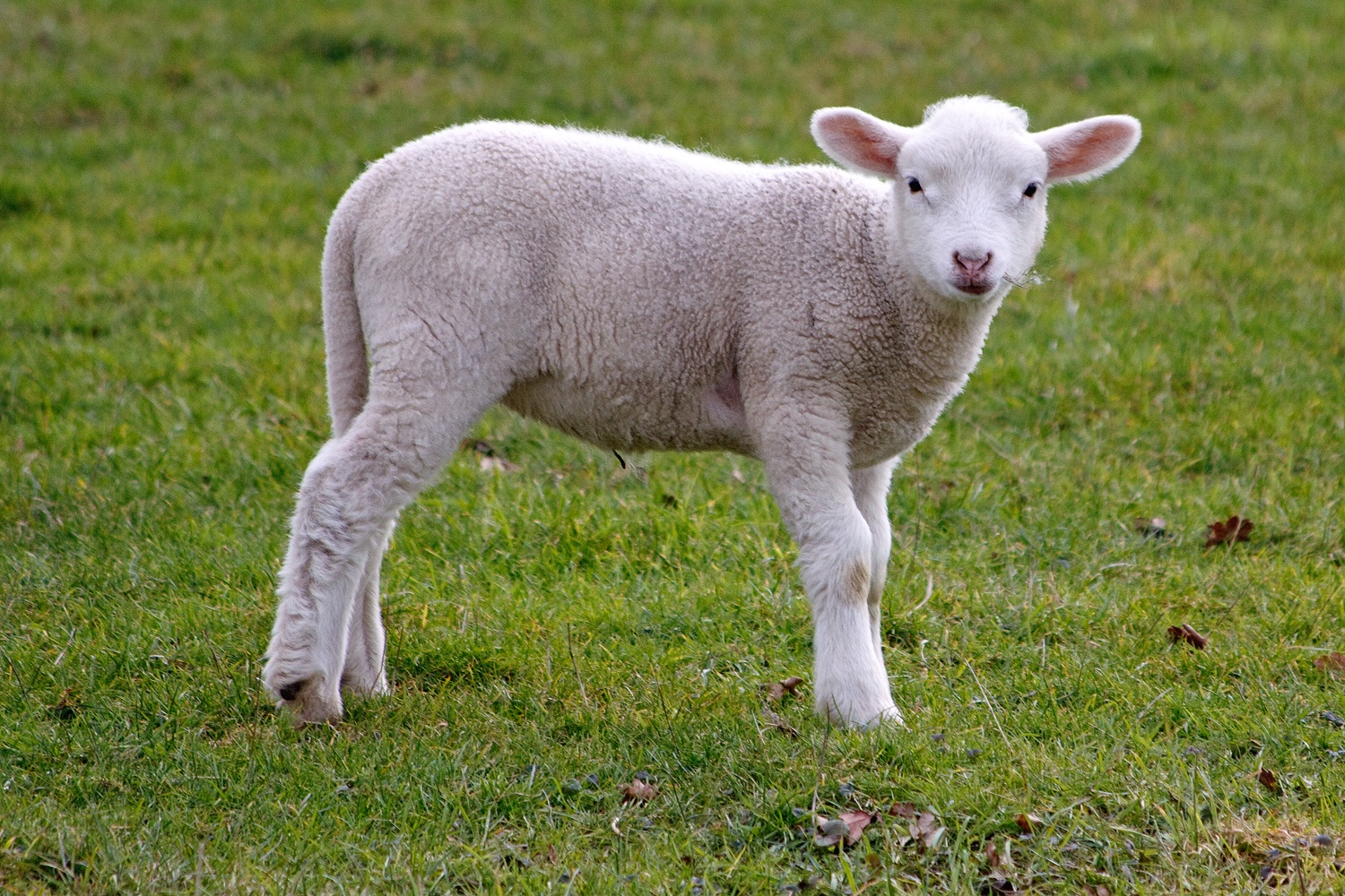 Lamm in den Lippeauen am Niederwerrieser Weg (Naturschutzgebiet „Mühlenlaar“) in Hamm